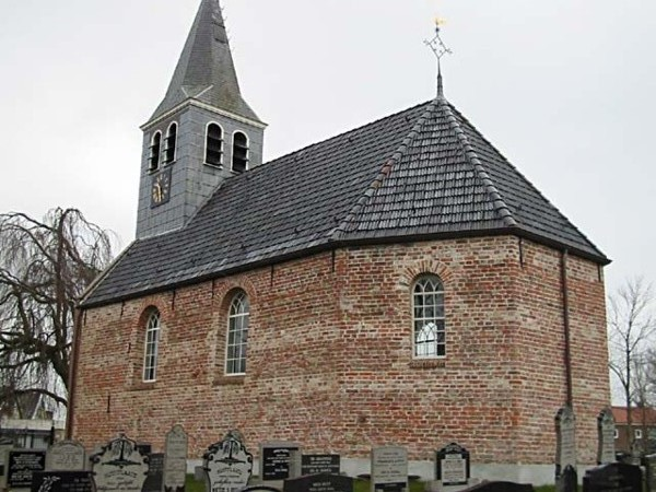 Kerk Ouwsterhaule